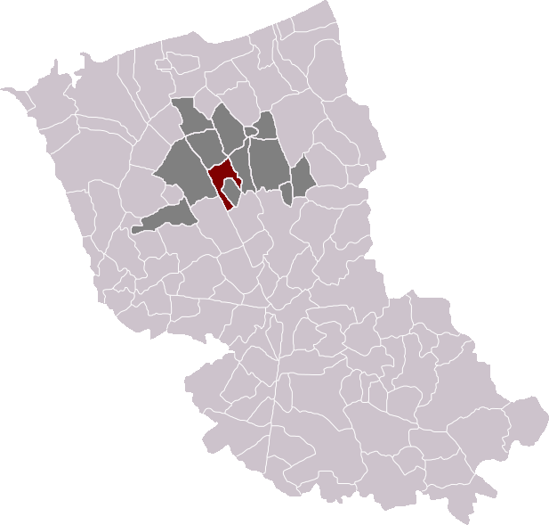 Locatie gemeente Krochte in arrondissement Duinkerke. Zelfgemaakt. Location of Crochte municipality in the arrondissement of Dunkirk. Self made. Localisation de la commune de Crochte dans l'arrondissement de Dunkerque. Fait moi-même.